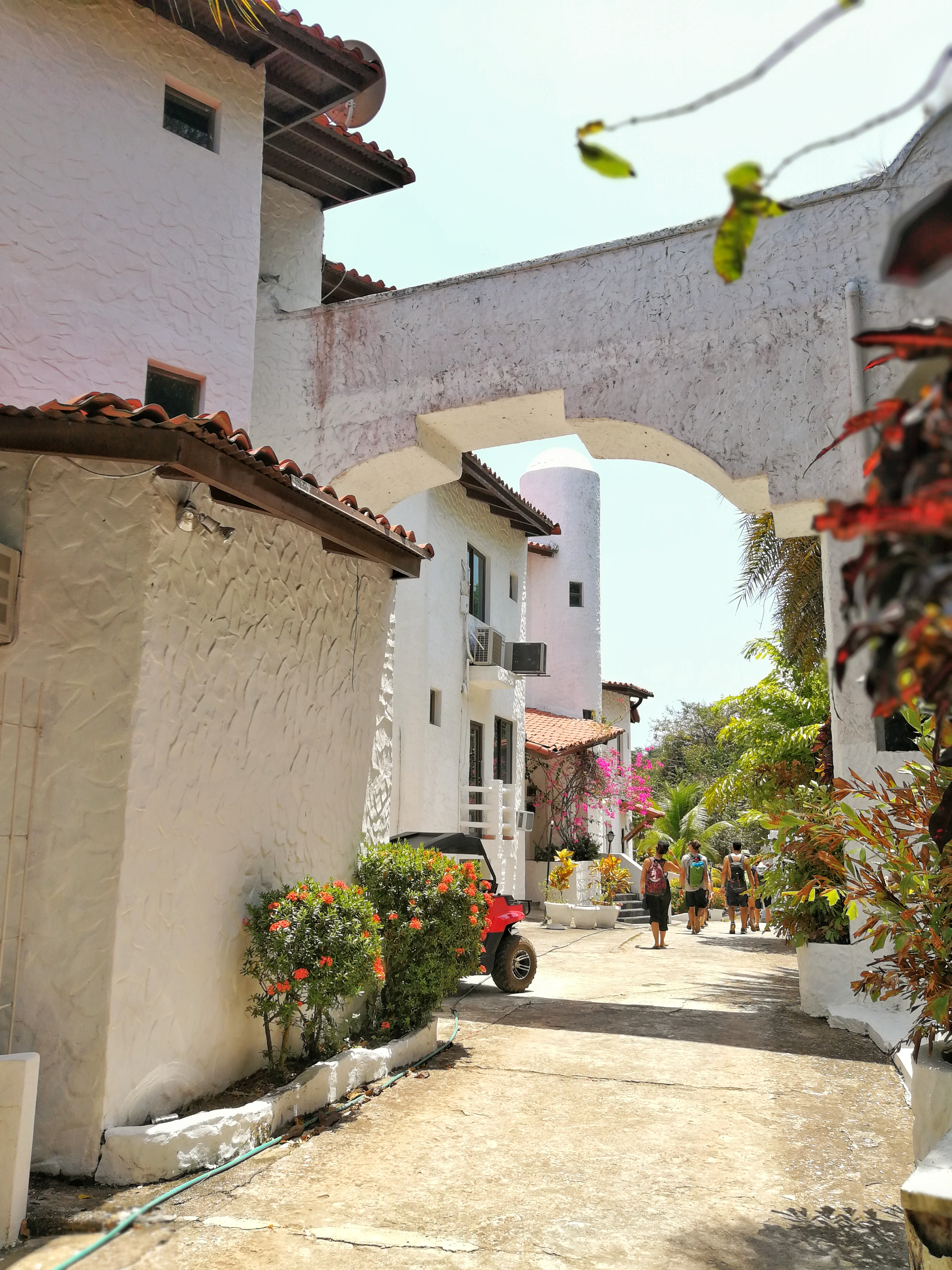 Fotografía en Verano, Calle dentro de la Isla Taboga en el Pacífico de Panamá